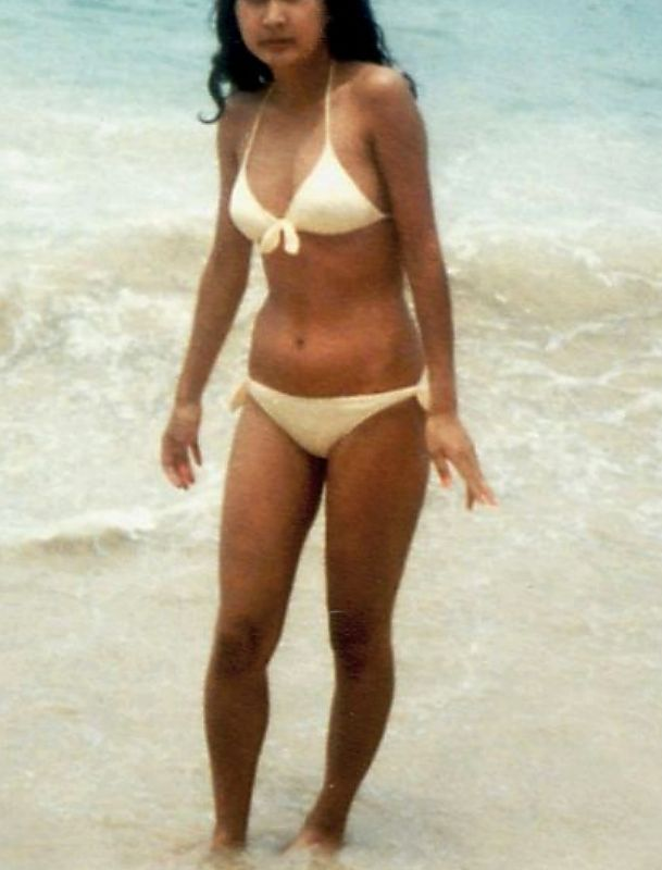 Low Rise Bikini ; Waikiki Beach (Honolulu, Hawaii)